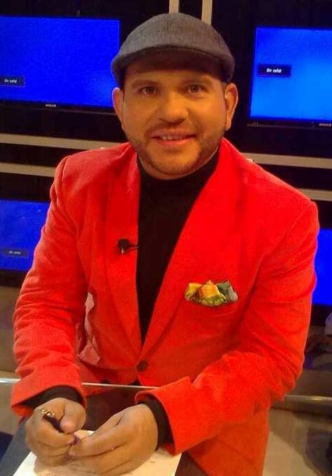 Panelista de El Debate en Telefuturo